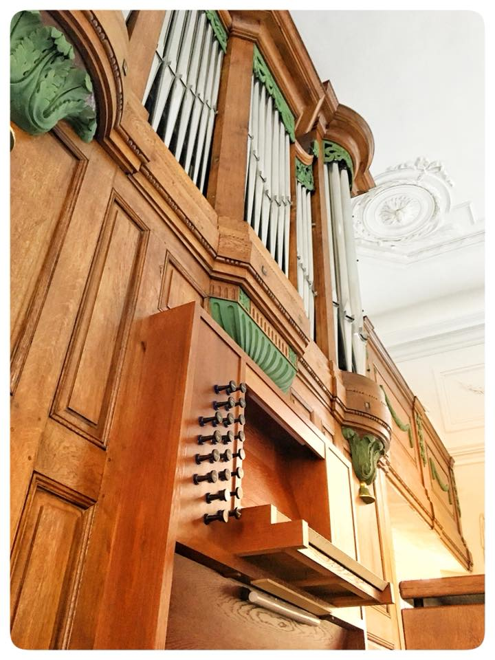 Wilbrandorgel von 1981, 2017-18 in Teilen umgebaut und ertüchtigt.